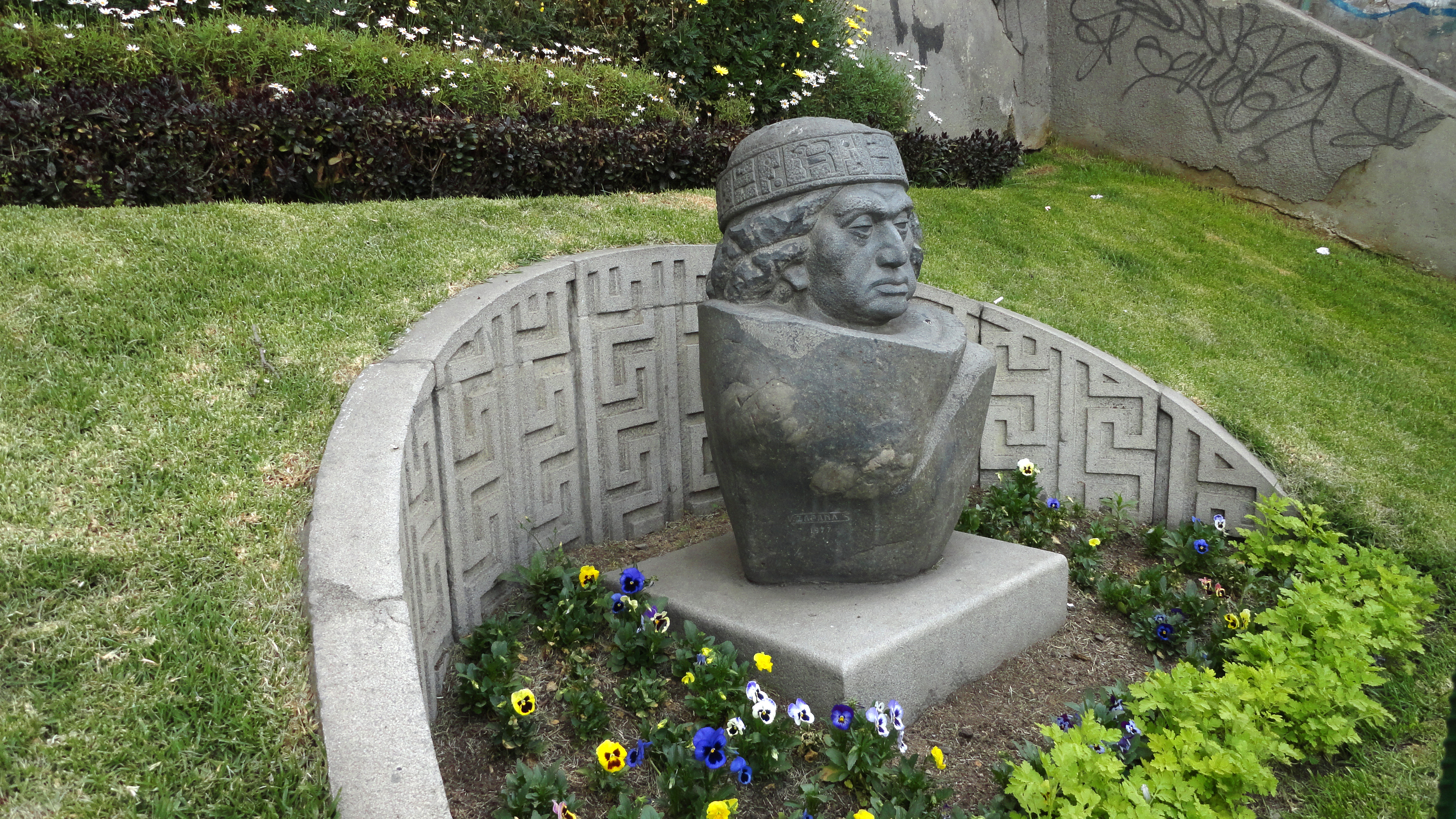 Cacique Uyustus This medium shows the protected monument with the number L/00-211 in Bolivia.